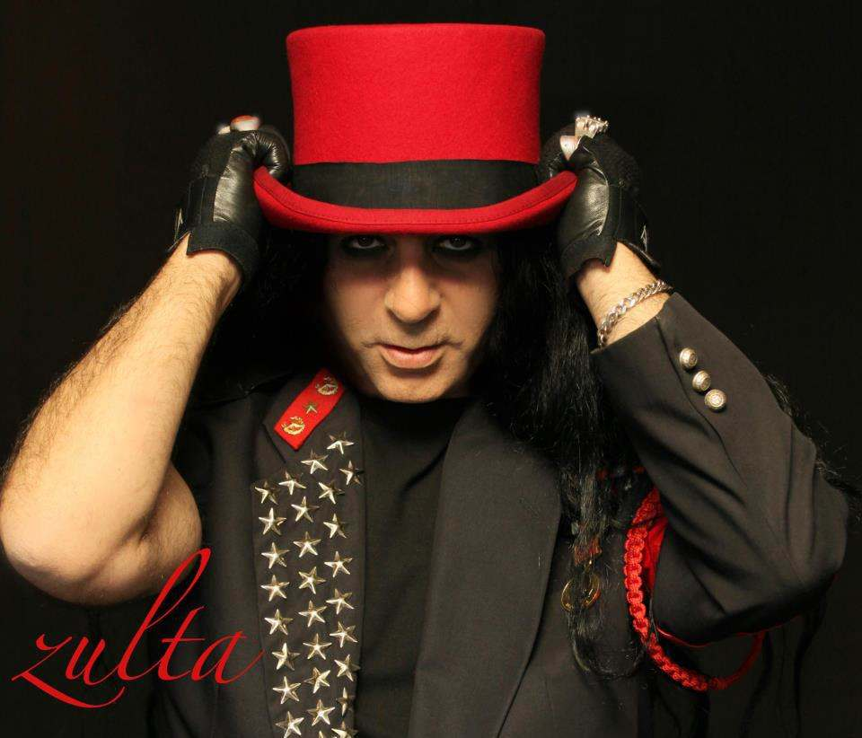 אלי זולטא 2012